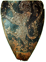 Abbildung des Seedorfer Schildes